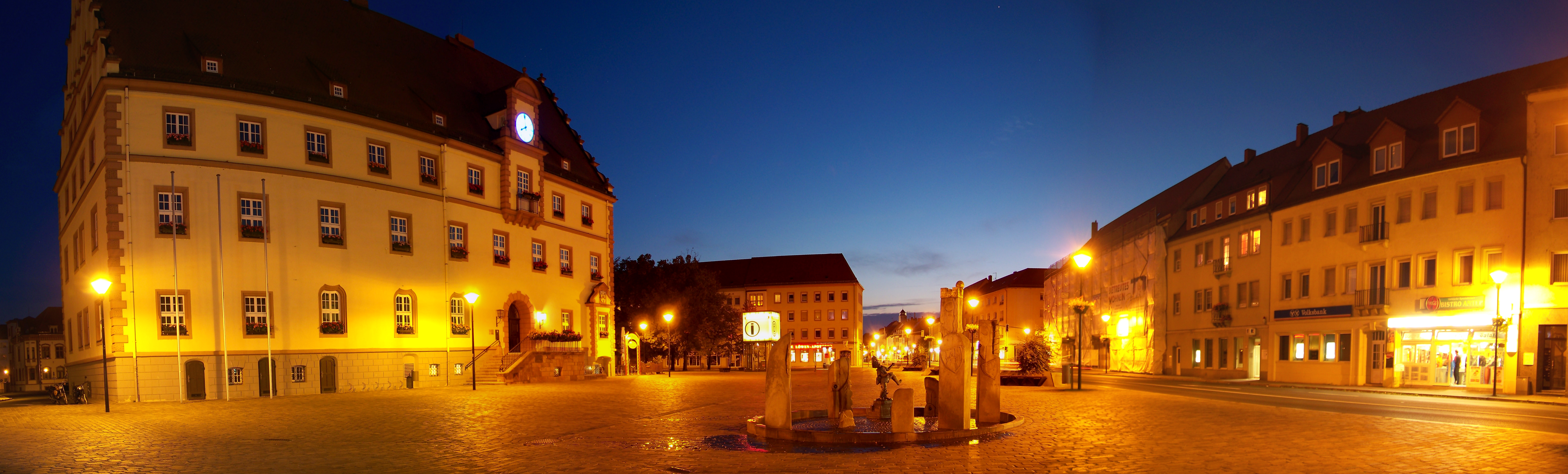 Nachtpanorama des Eilenburger Marktplatzes